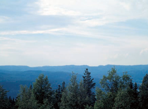 LysebuOrreskogen